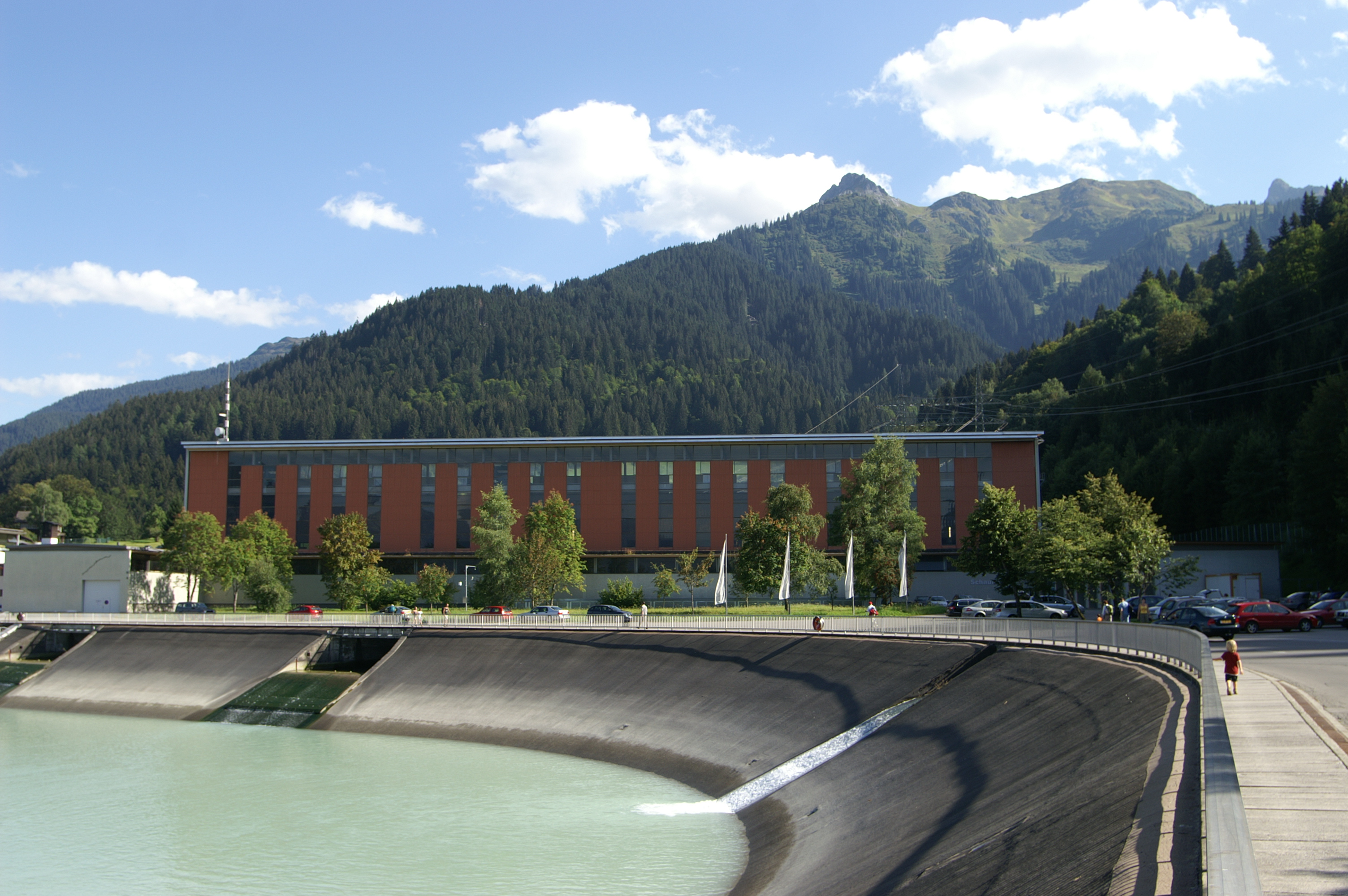 Kraftwerk der Vorarlberger Illwerke in Latschau, oberhalb von Tschagguns, Vorarlberg